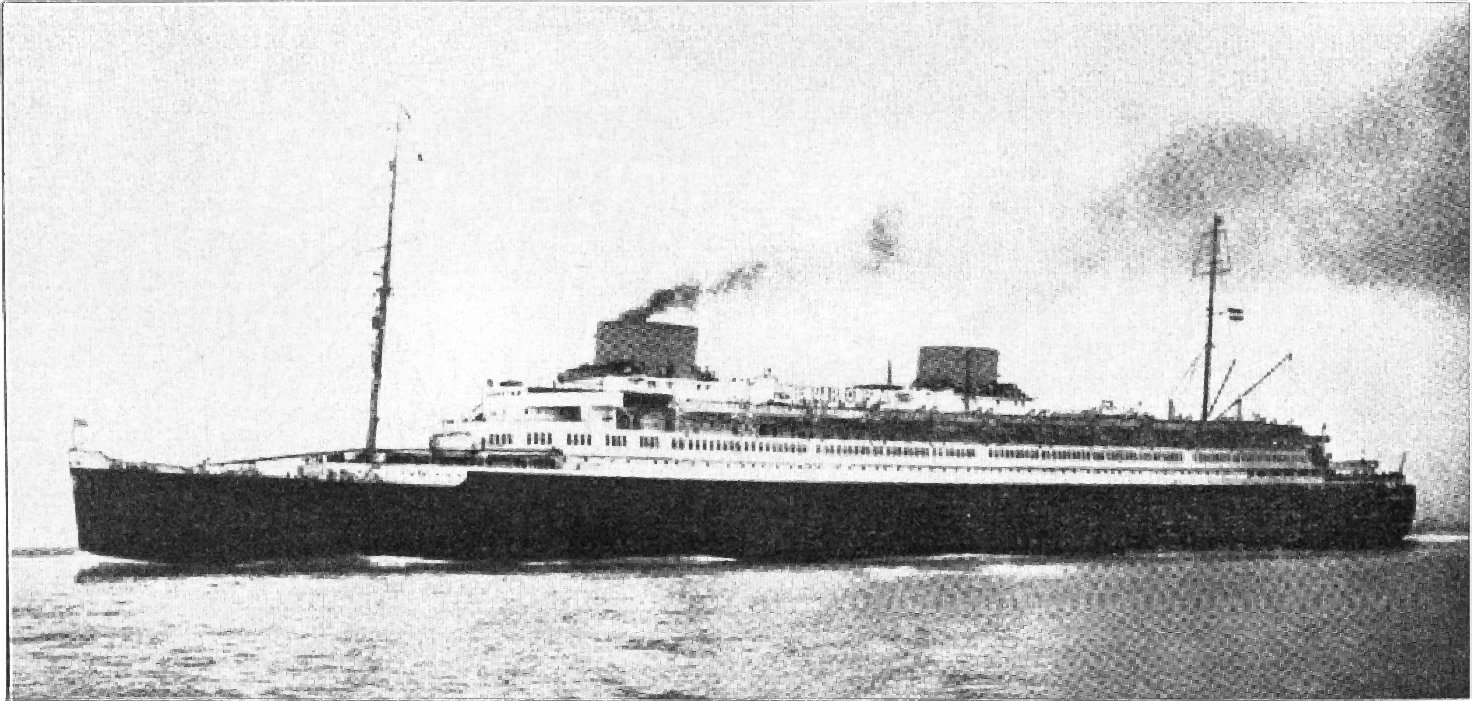 Vierschrauben-Schnelldampfer Europa, 1932. Bild aus Meyers Blitz-Lexikon, Spalte 87/88 übernommen.